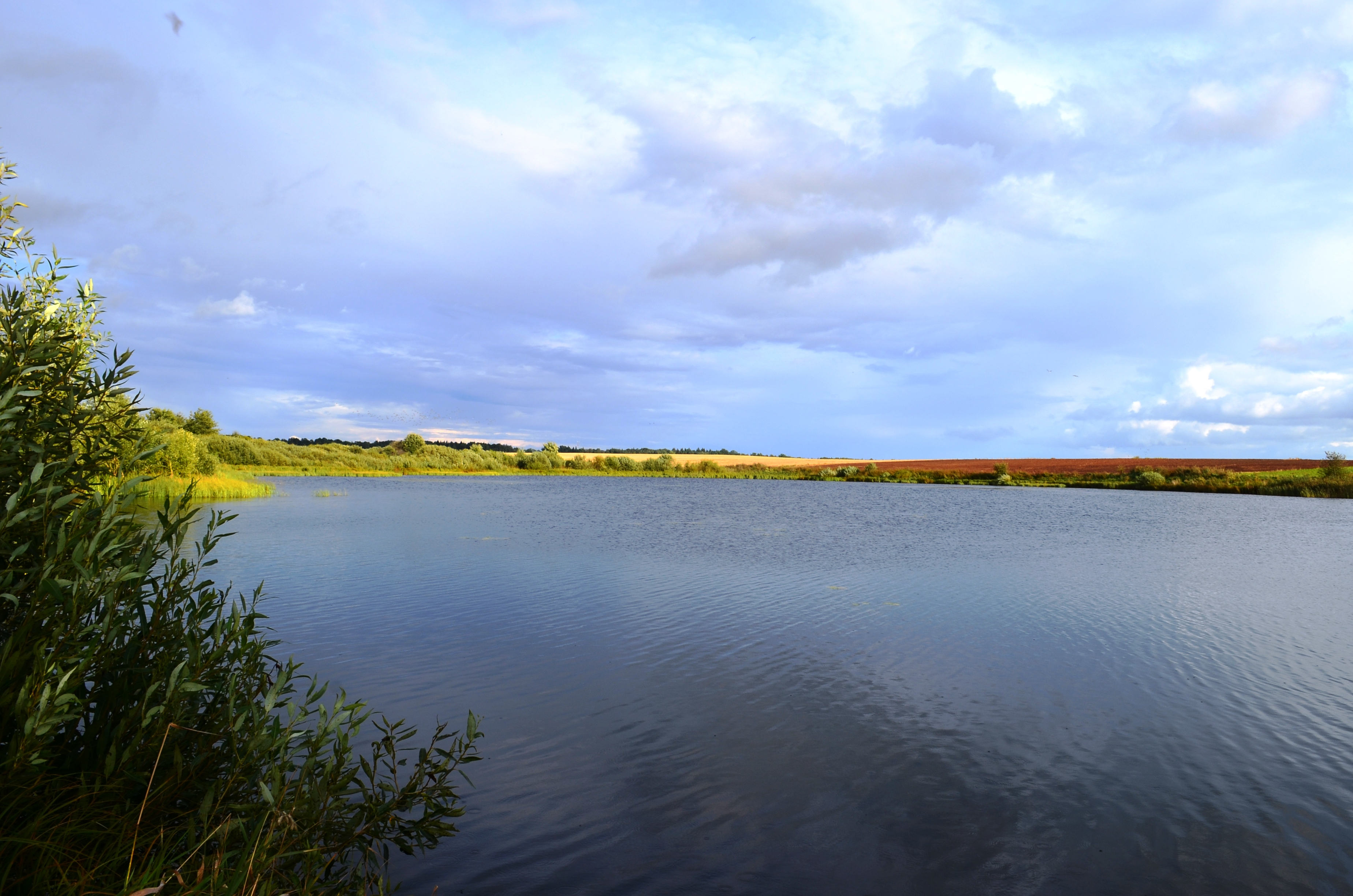 Rezgių tvenkinys, Kėdainių r.